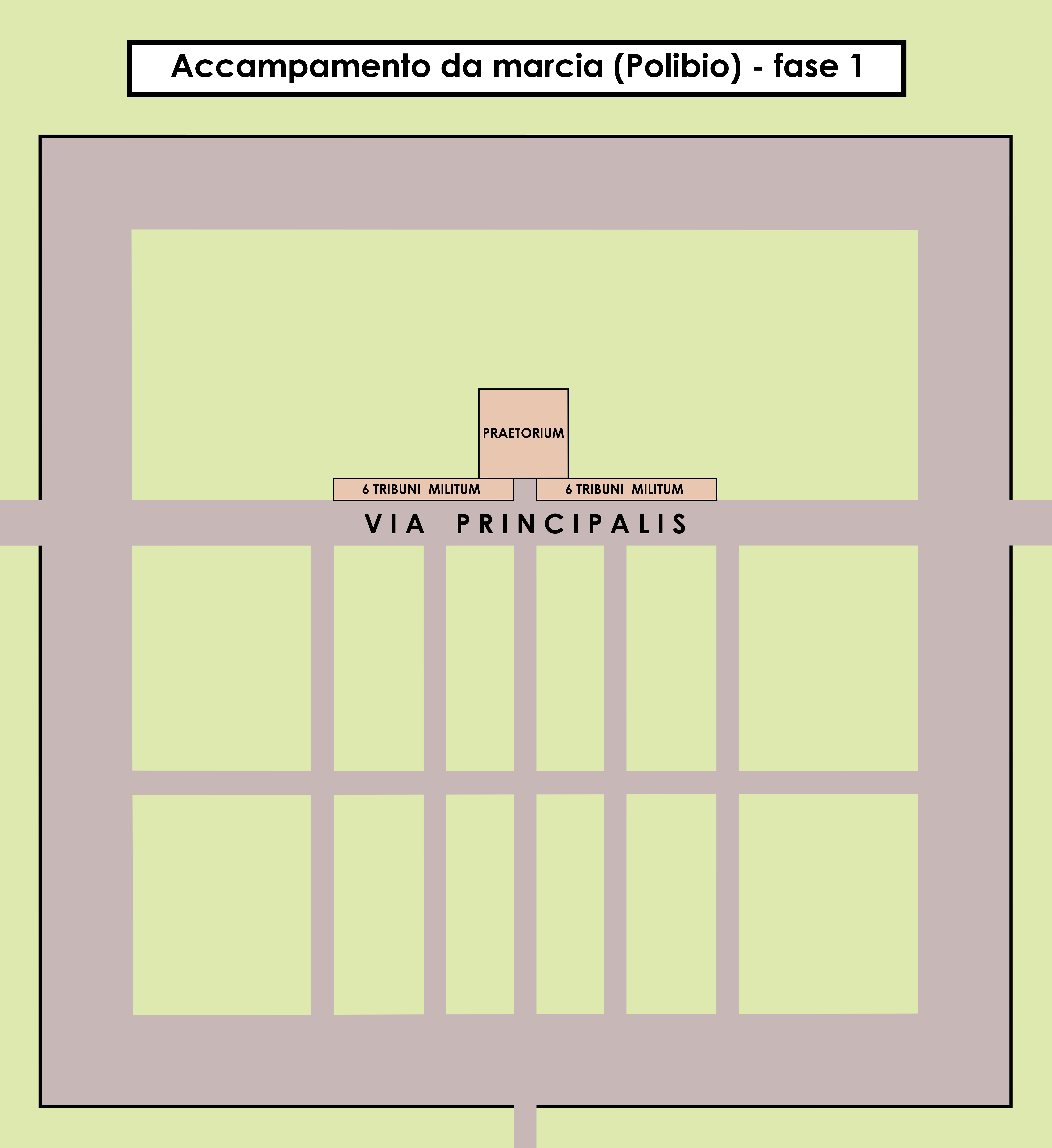 L'accampamento militare romano da marcia secondo Polibio: la prima fase prevede la disposizione delle tende del comandante (Praetorium) e dei tribuni militari